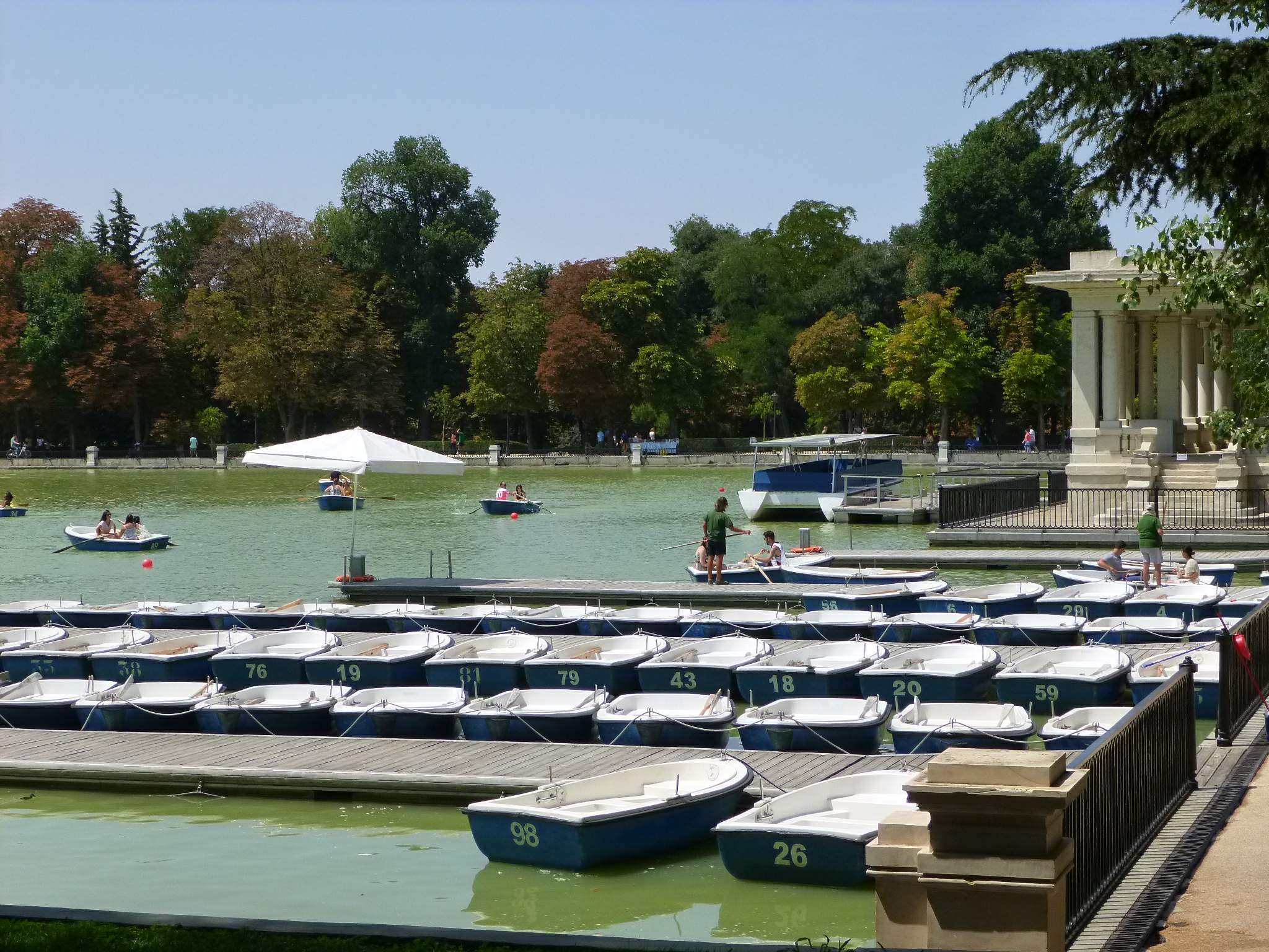 Madrid - Parque del Retiro